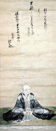 斎藤徳元の肖像。